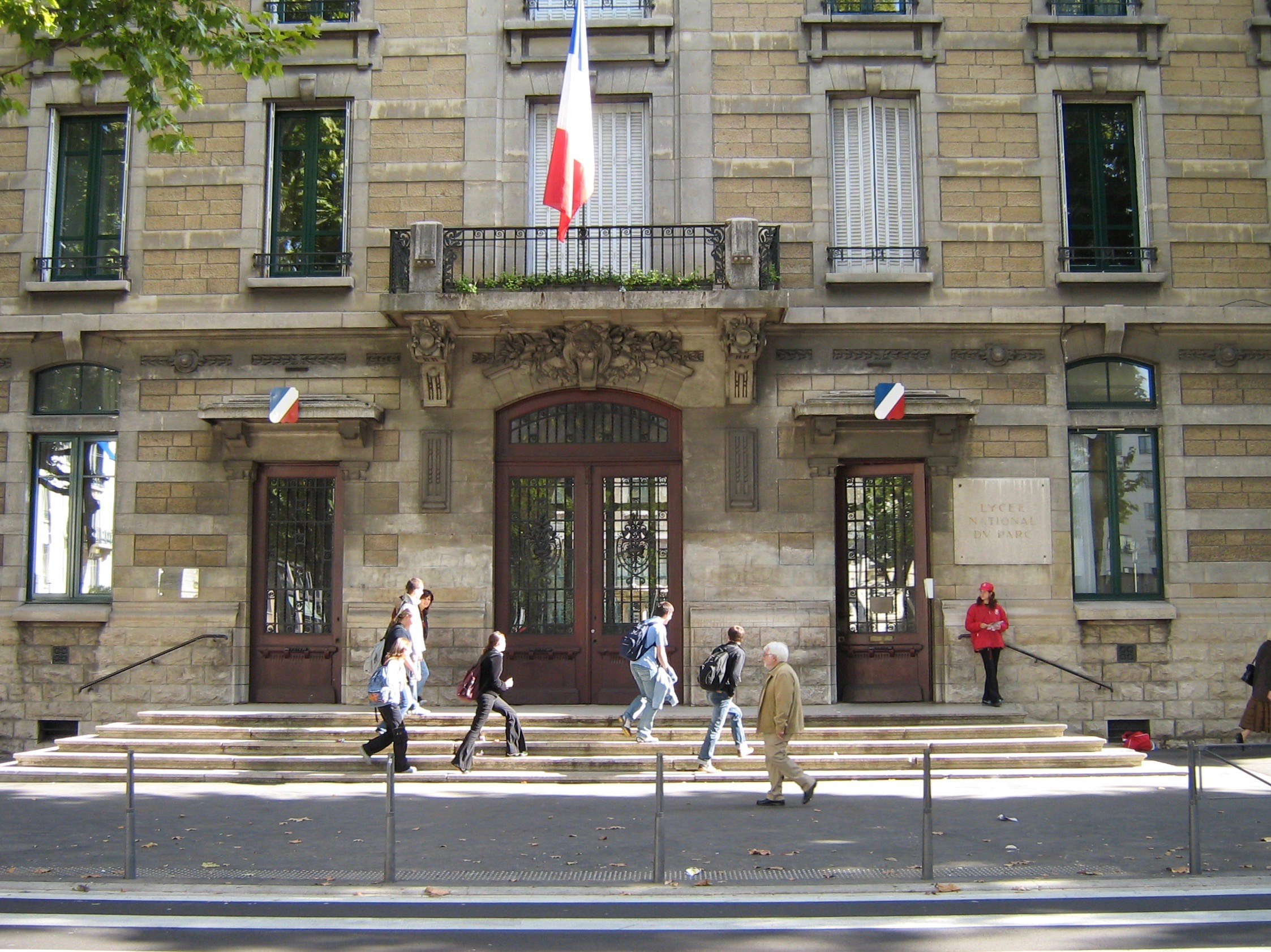 Entrée du Lycée du Parc à Lyon.